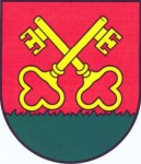 Erb Petrovce nad Laborcom